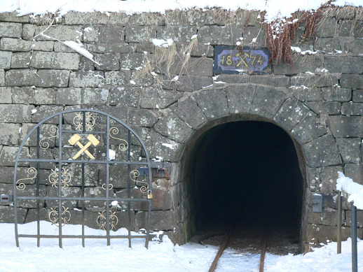 Befahrbarer Tiefer Sachsenstollen des Bergbaumuseums Lautenthal